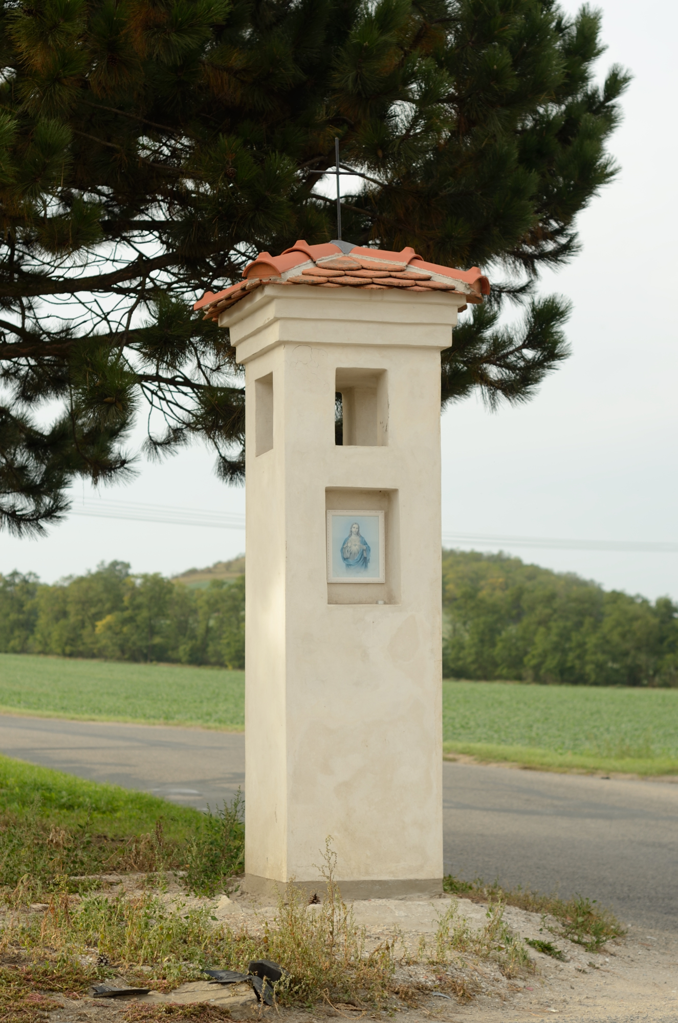 Boží muka (Letkovice), při silnici do Oslavan, Letkovice